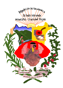 Escudo del municipio Cristóbal Rojas, estado Miranda, Venezuela